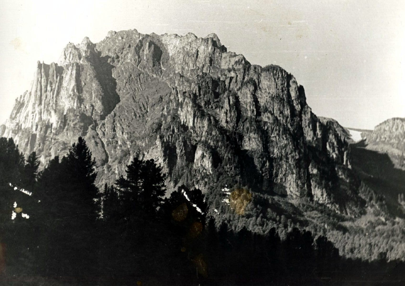 Скала "Черный альпинист" около озера Уймень